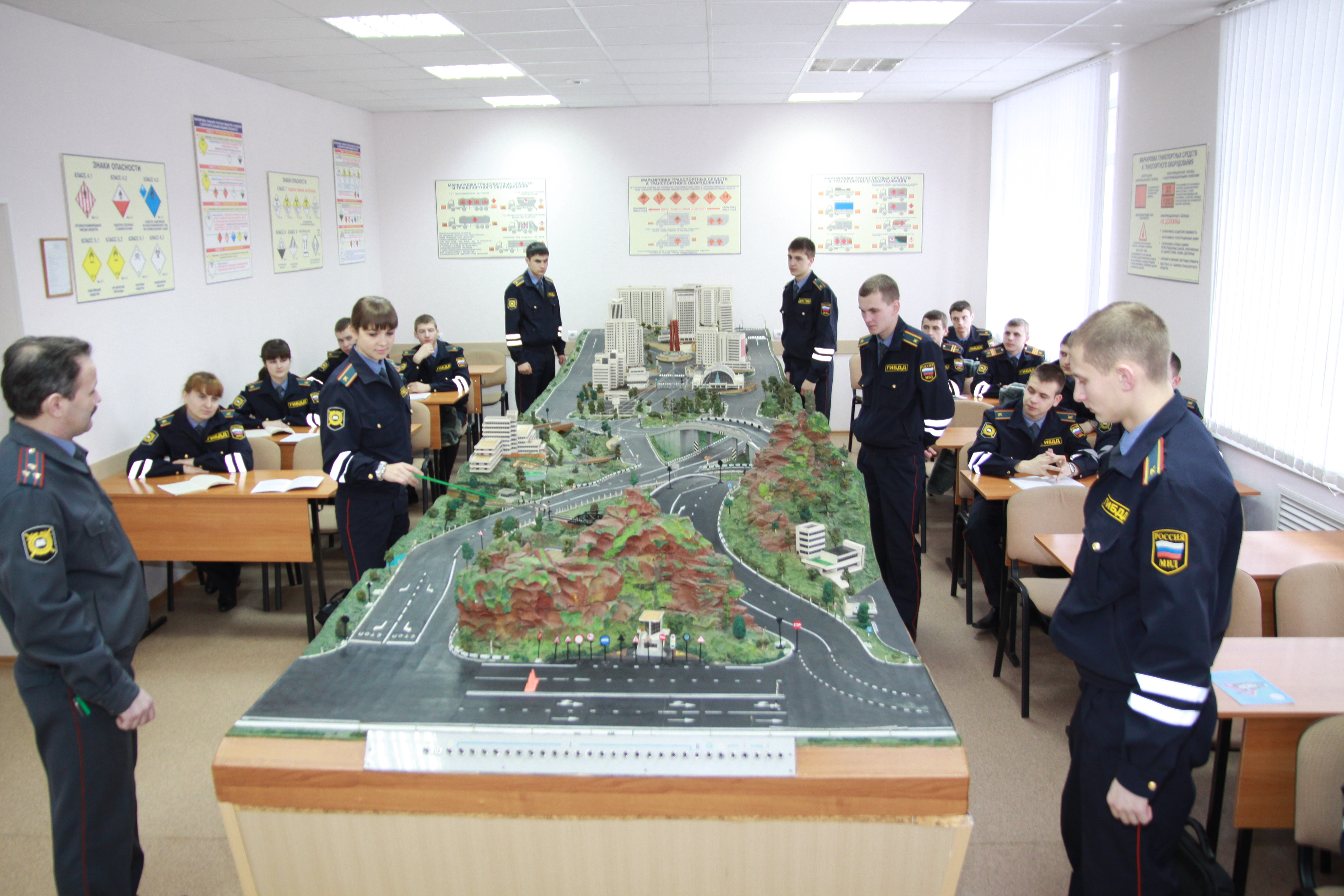 Класс дорожной инспекии и организации движения